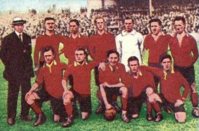 L'équipe de Belgique championne olympique de football, en 1920 à Anvers, 'Panini Olympia 1896 - 1972', Panini figurina n°64.